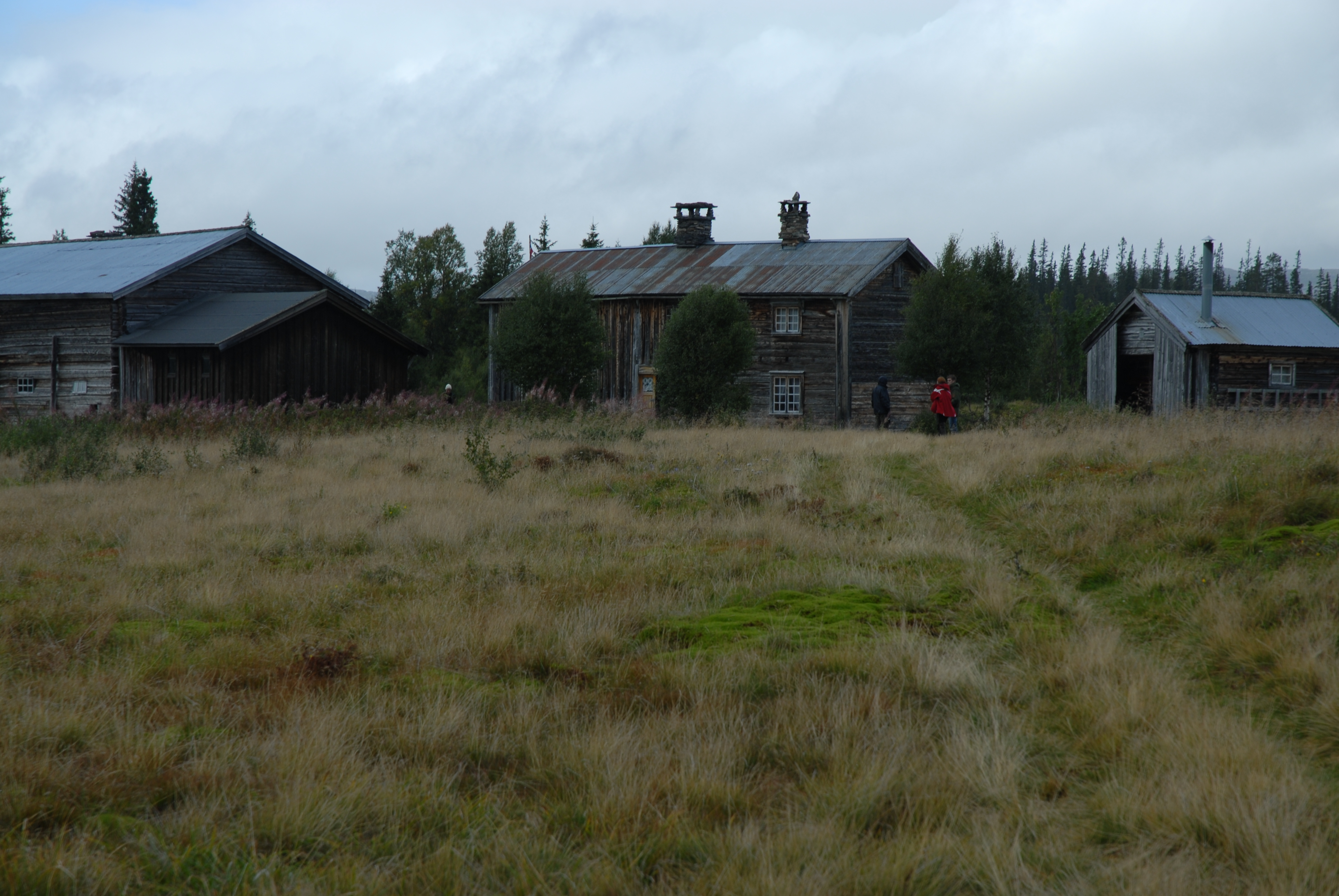 Innmark og gårdstun på Gressåmoen fjellgård